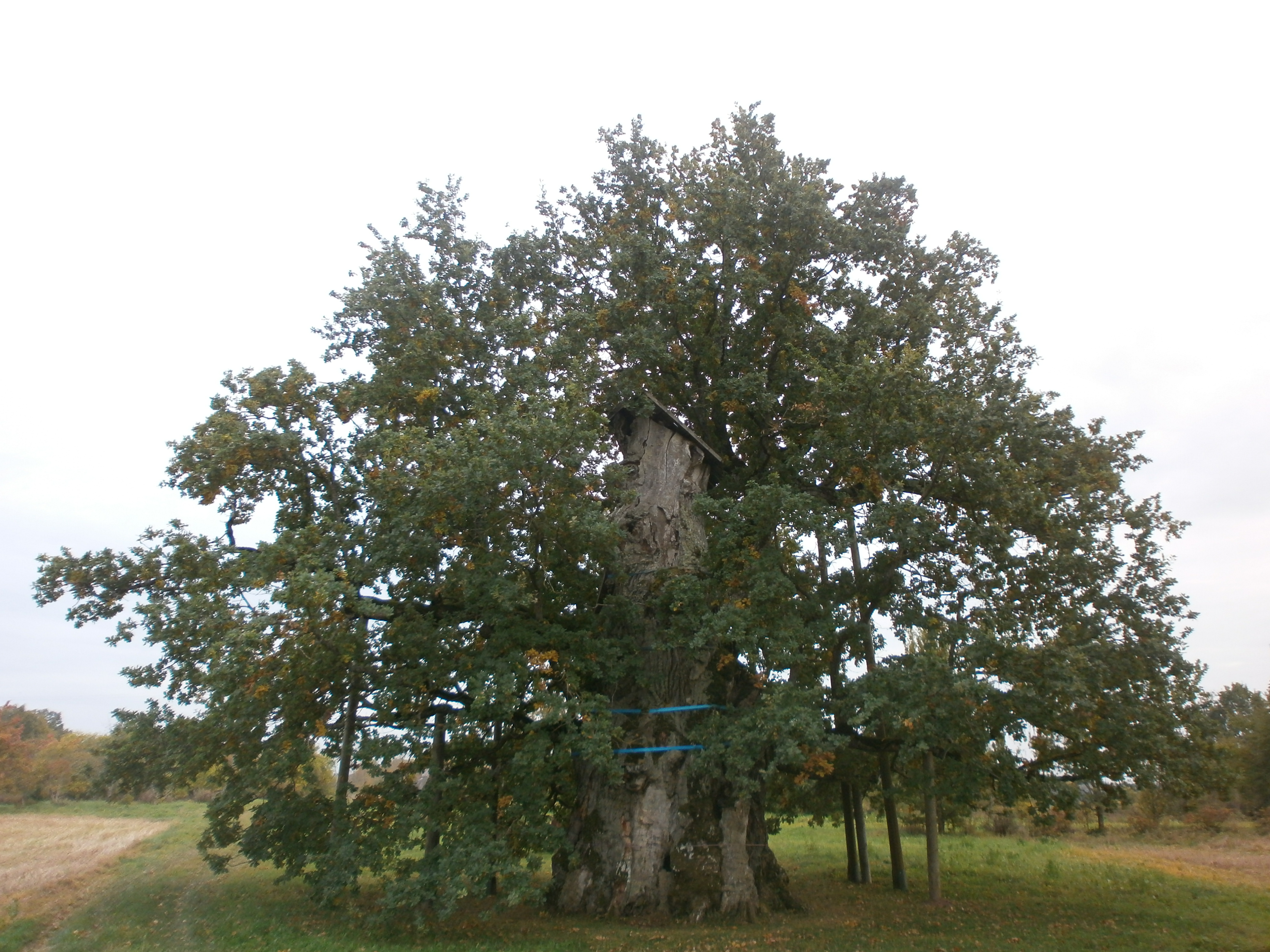 Kaives Senču ozols